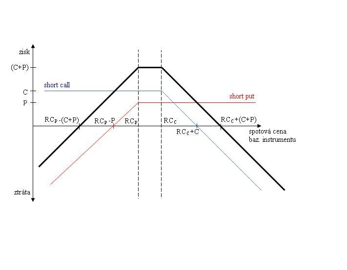 Česky: SHORT STRANGLE